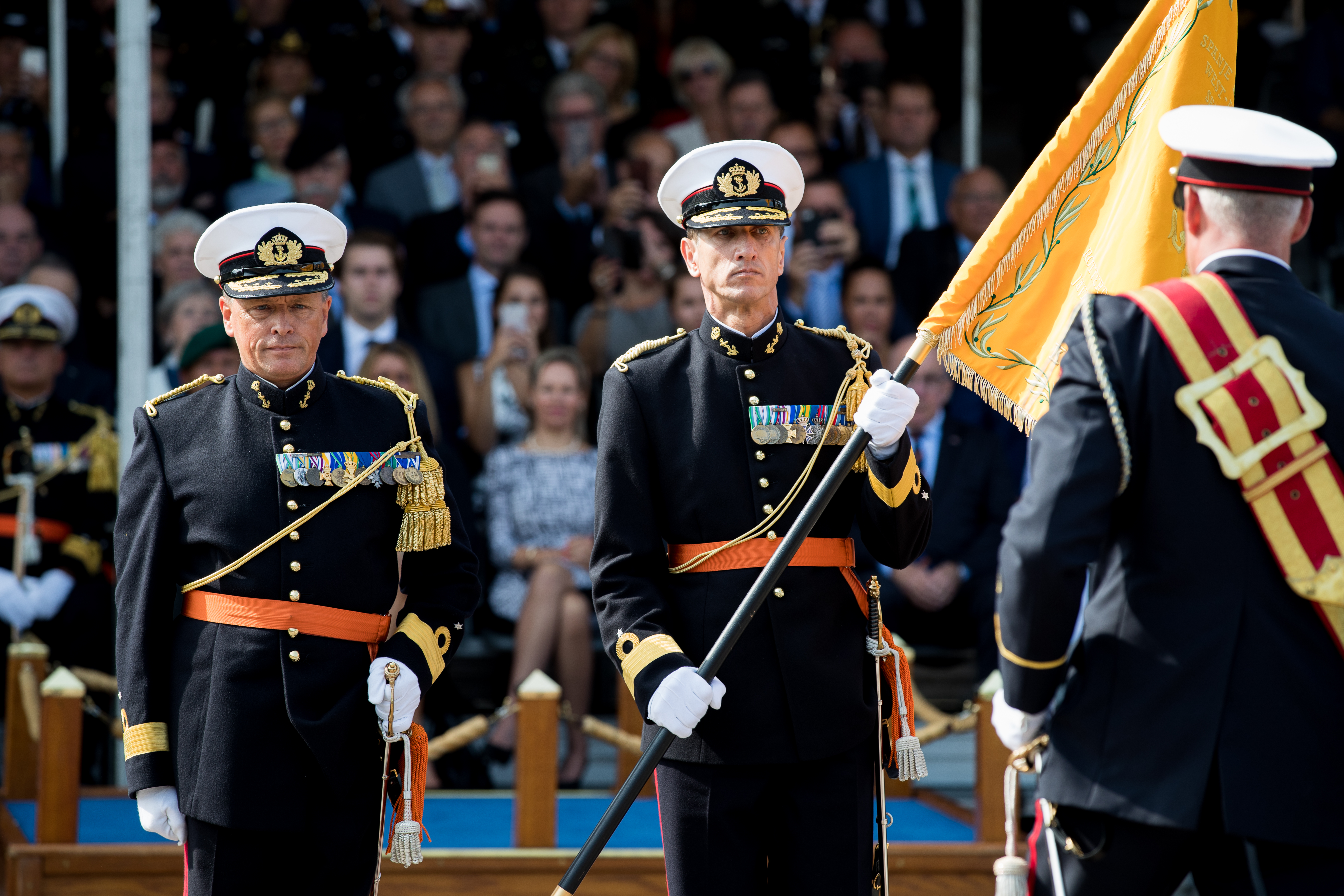 Doorn, 1 september 2017 Interviewfoto's Brigade Generaal der Mariniers (Jeff) Mac Mootry